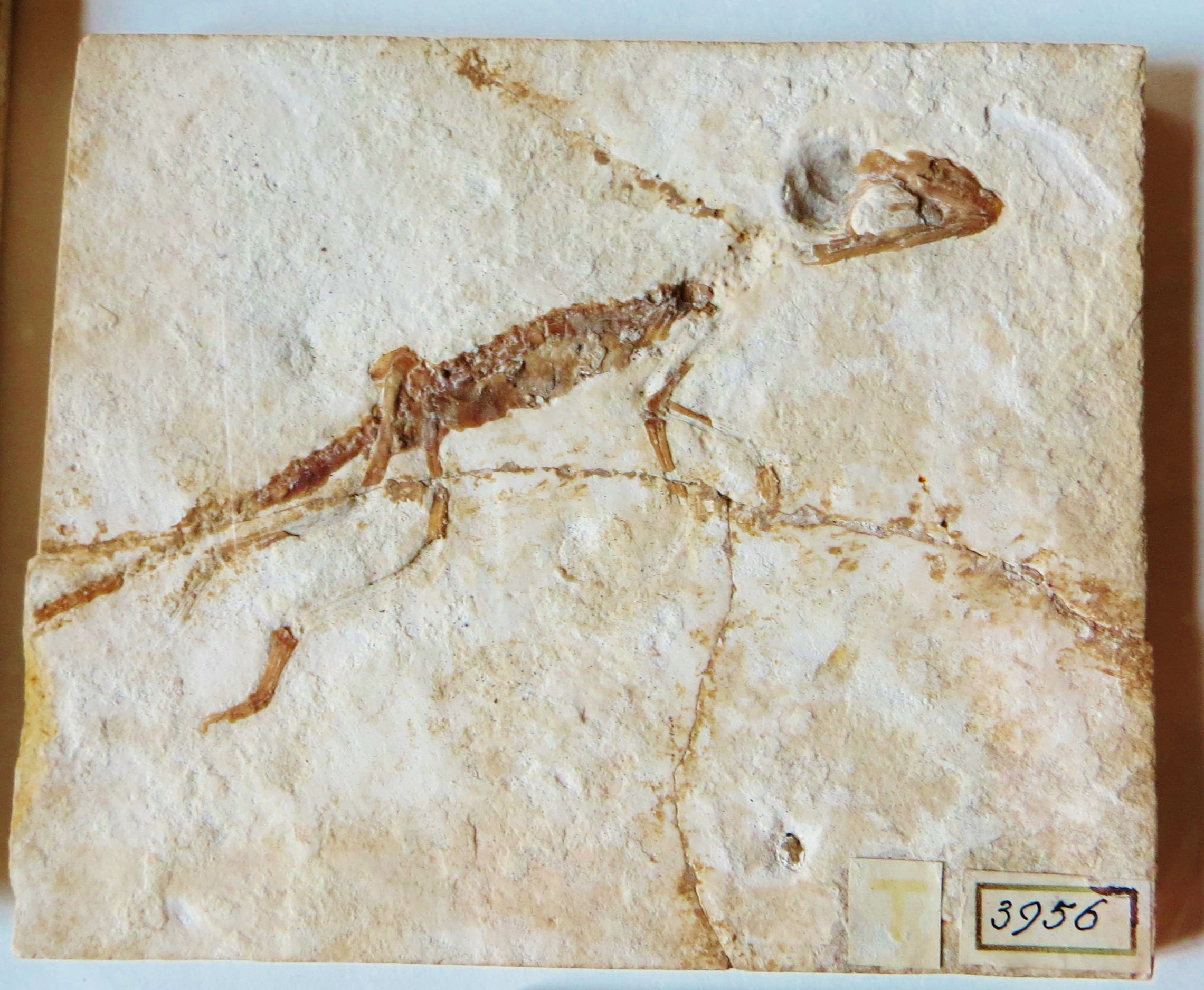 Fossil of Atoposaurus, an extinct reptile- Took the picture at Teylers Museum, Haarlem